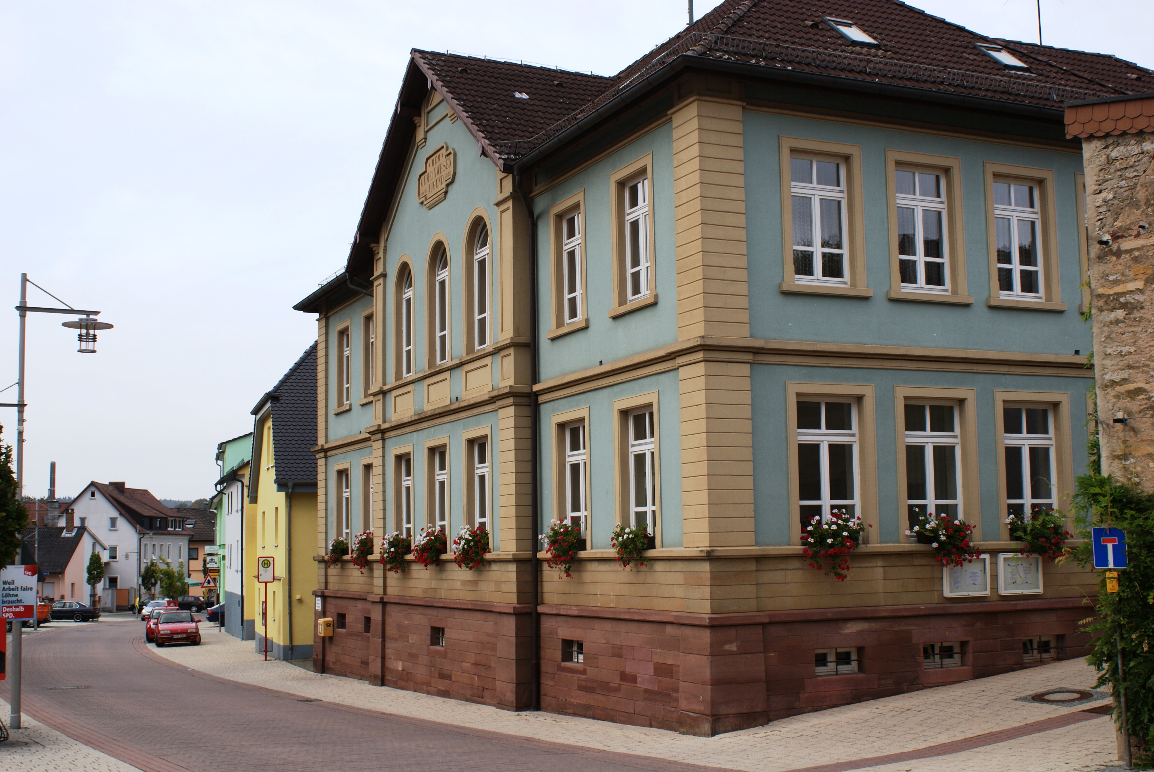 Rathaus Wöschbach, Gemeinde Pfinztal, Baden-Württemberg, Deutschland